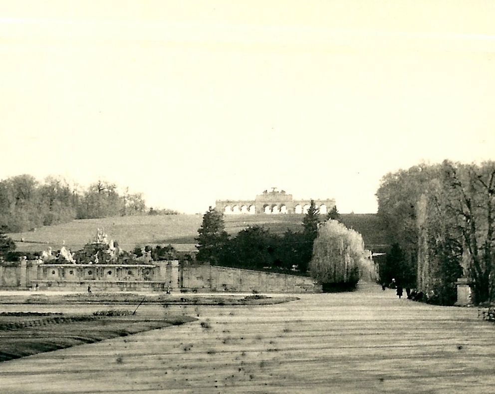 Die Gloriette des Schlosses Schönbrunn